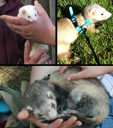 panorama furets